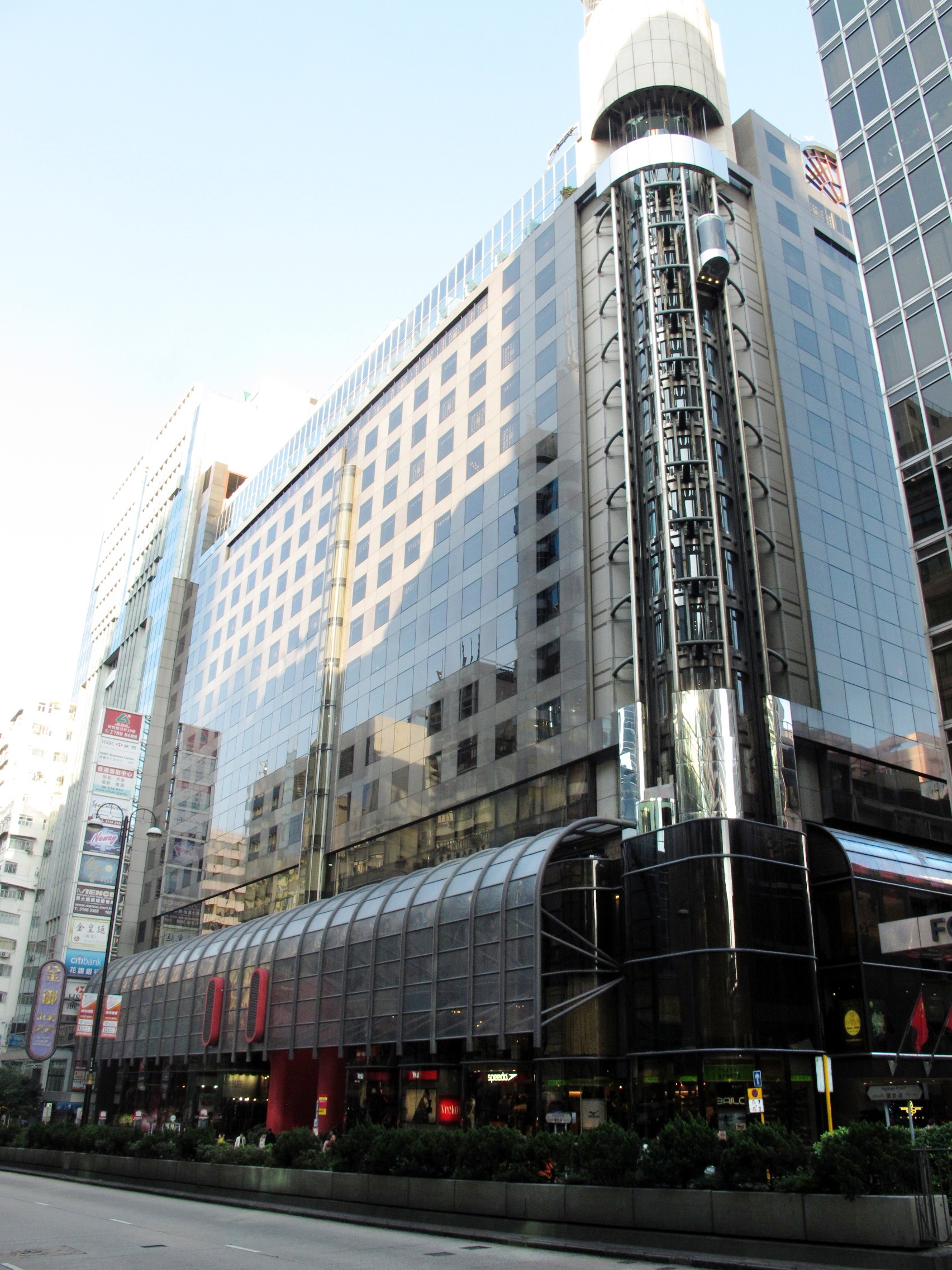 Prudential Centre, Jordan